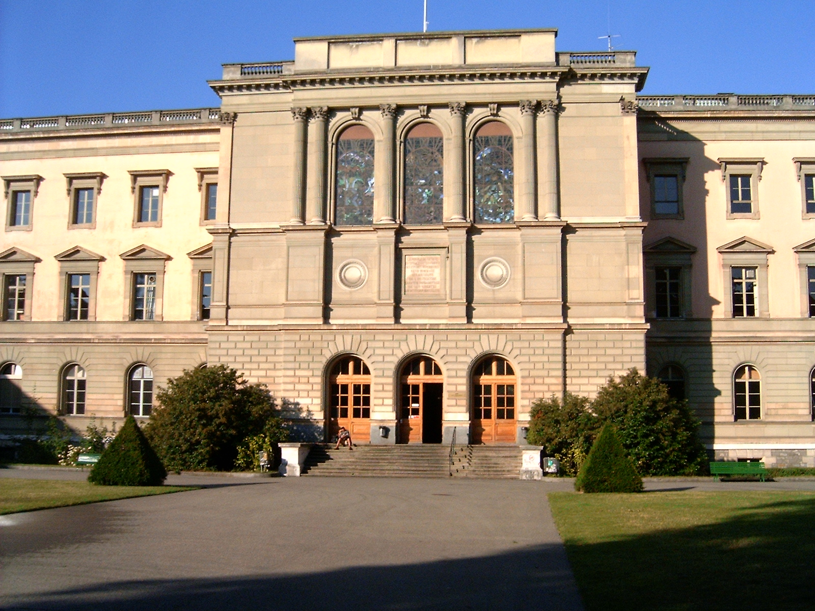 Entrée de l'Université de Genève, côté Bastions